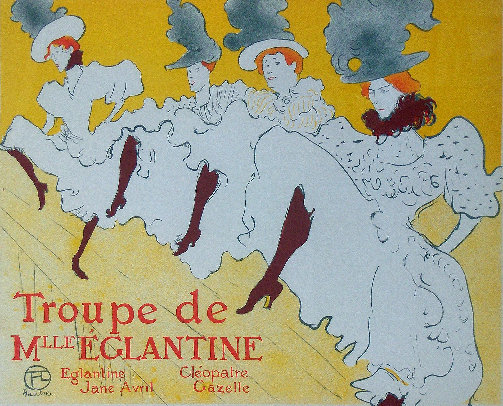 "Troupe de Mlle. Eglantine" (1895/1896), gekleurde seriegrafie van een werk van Henri de Toulouse-Lautrec; privé bezit